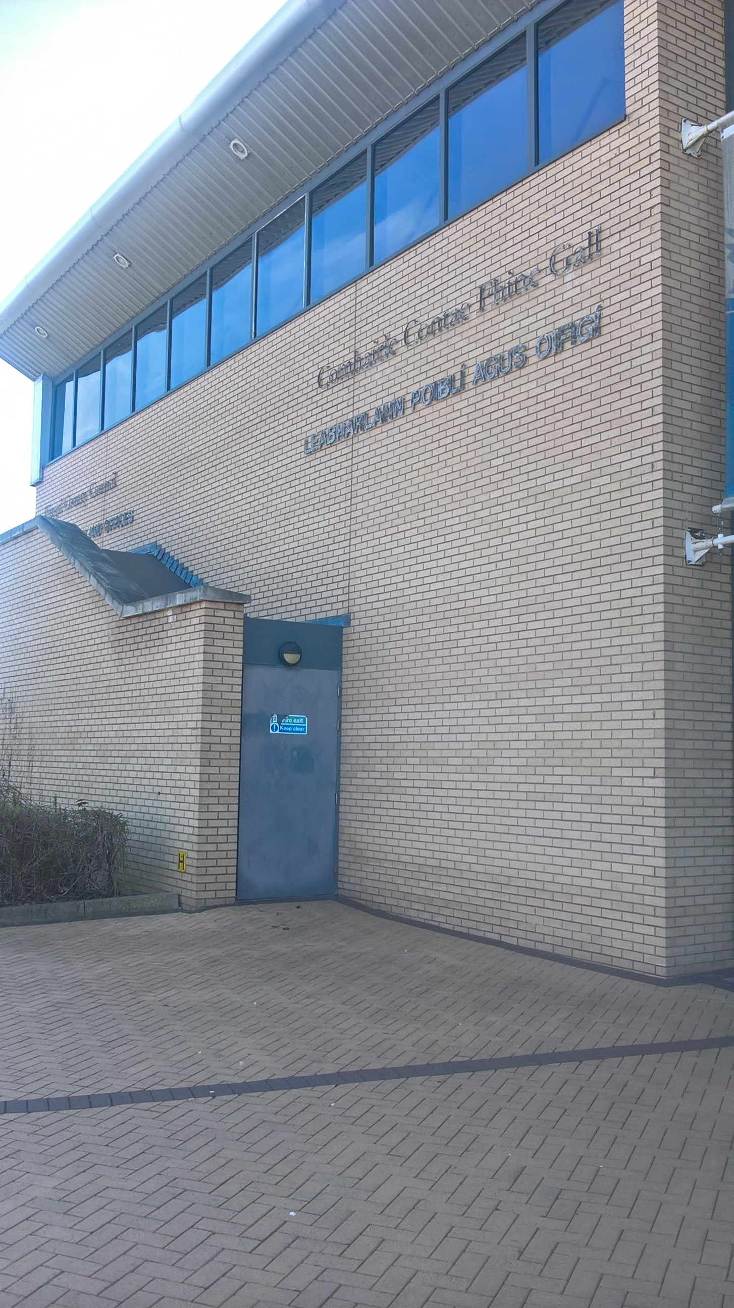 Leabharlann Bhaile Bhlainséir.